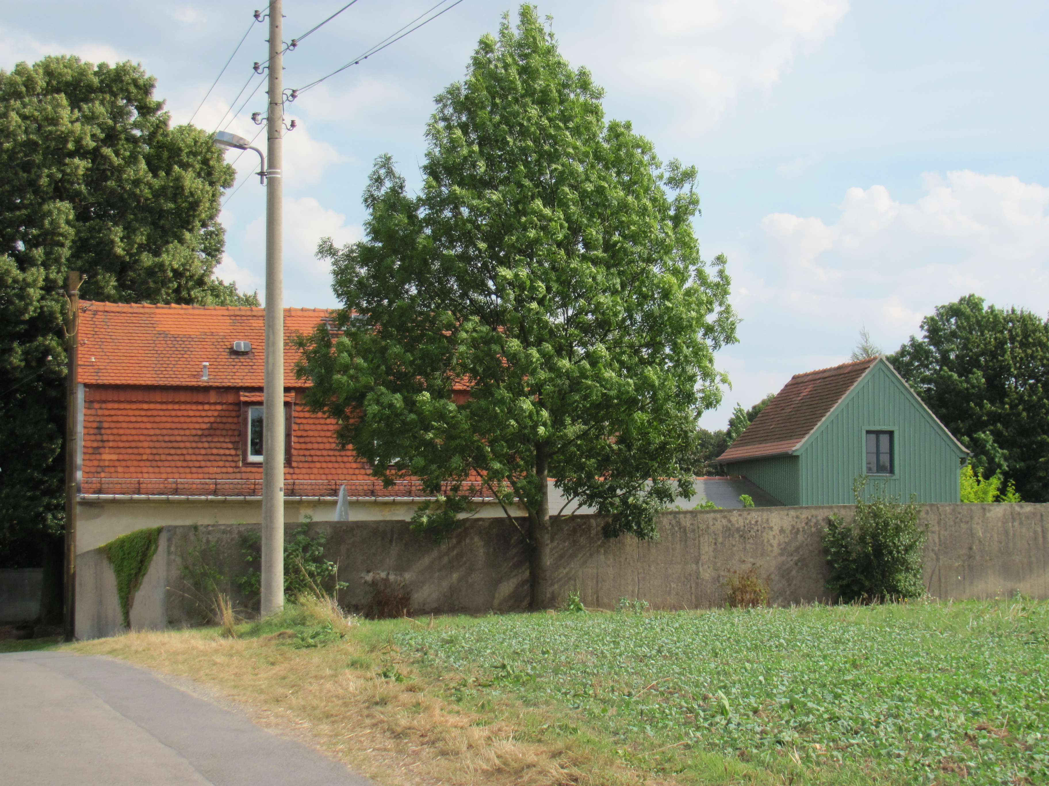 Radebeul, Tautzschgenhof Wirtschaftsgebäude